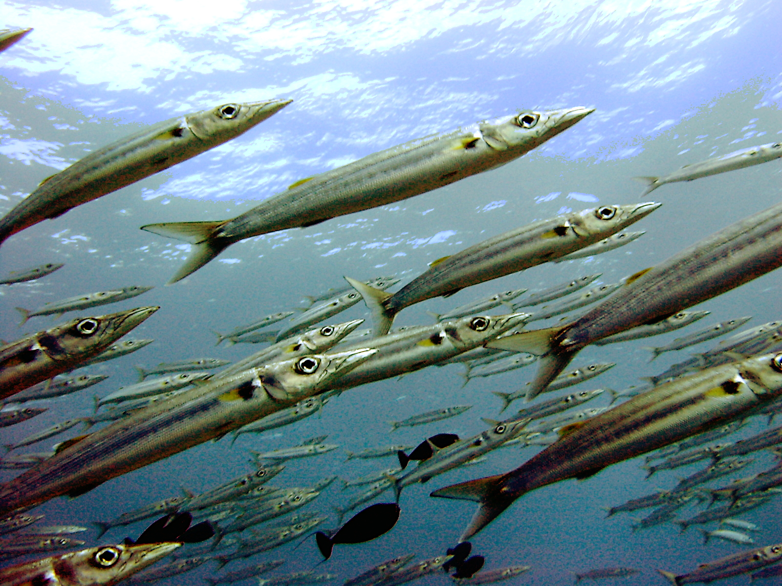 Sphyraena forsteriBigeye barracuda